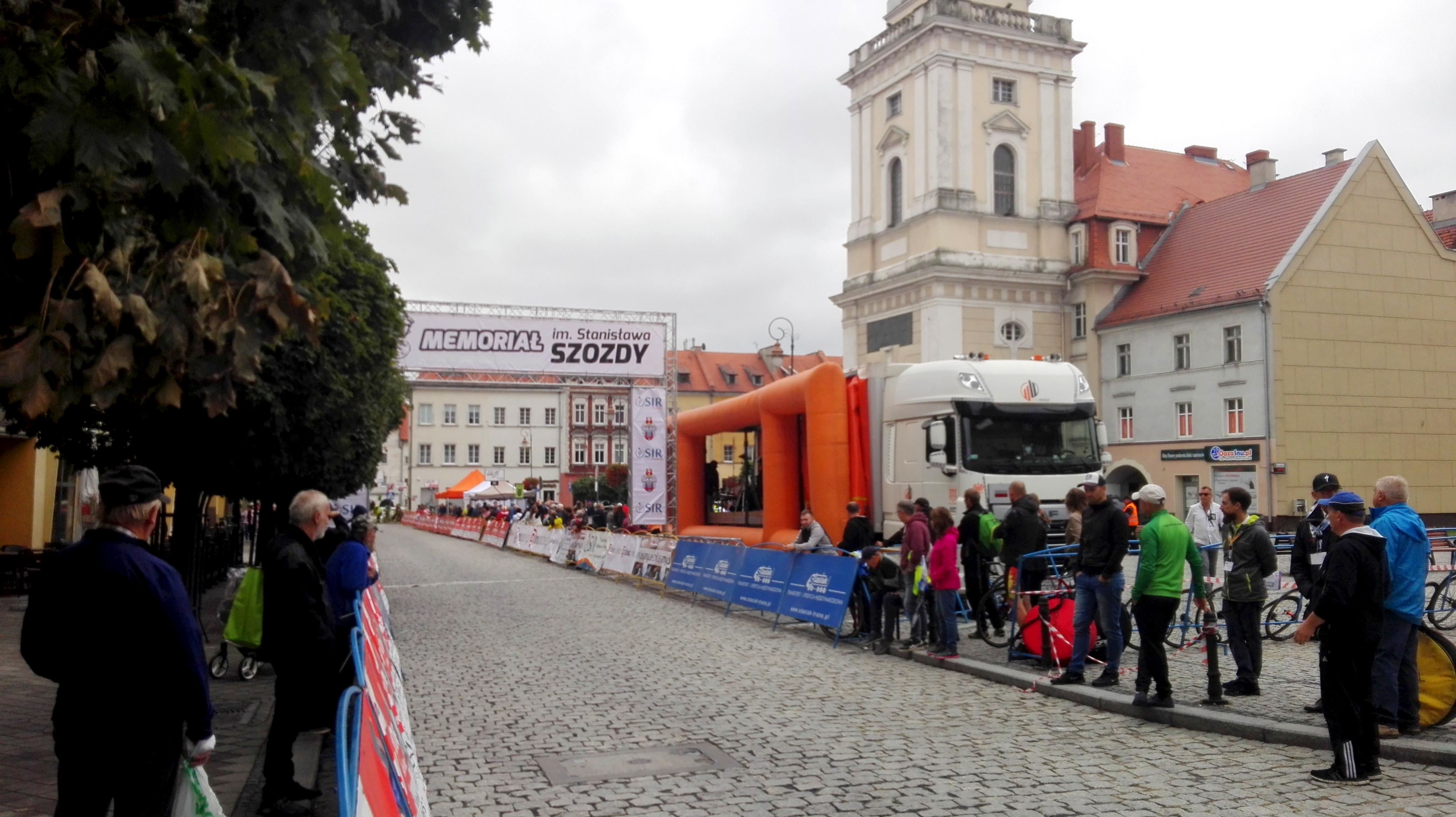 Prudnik, VI Memoriał im. Stanisława Szozdy